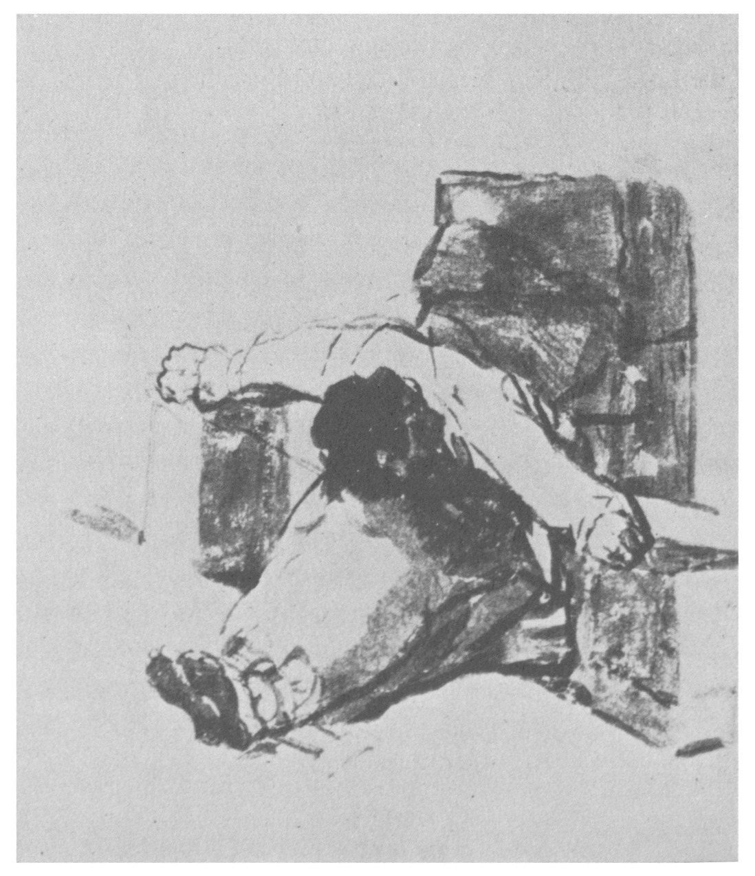 Galileo en manos de la Inquisición